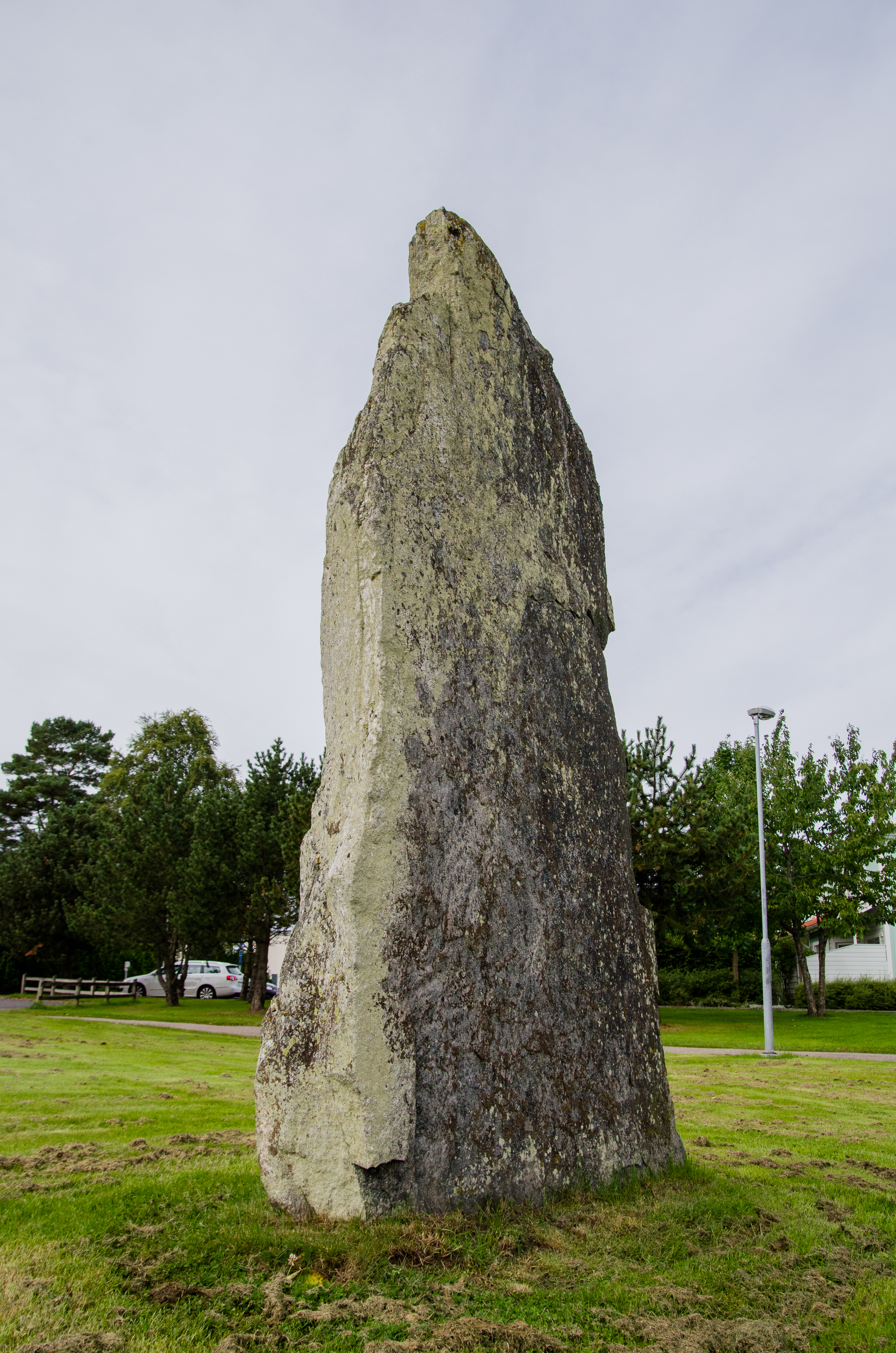 Grav markerad av sten/block.